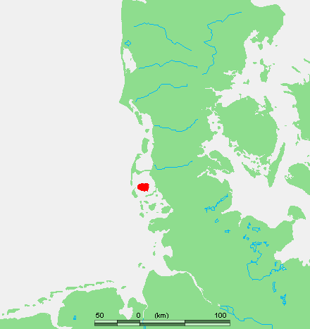 Wadden - Föhr